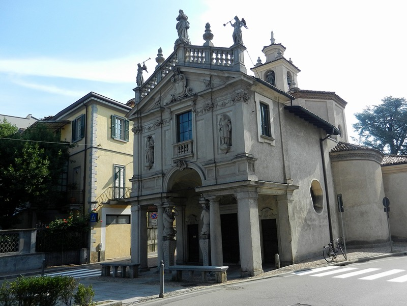 Varese - Santuario della Madonnina in Prato